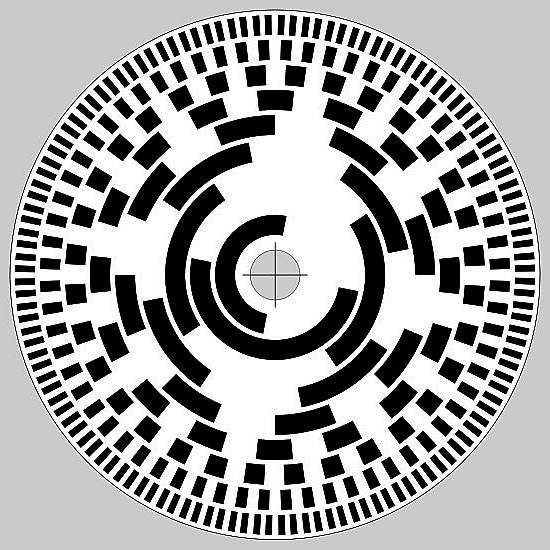 Gray disk